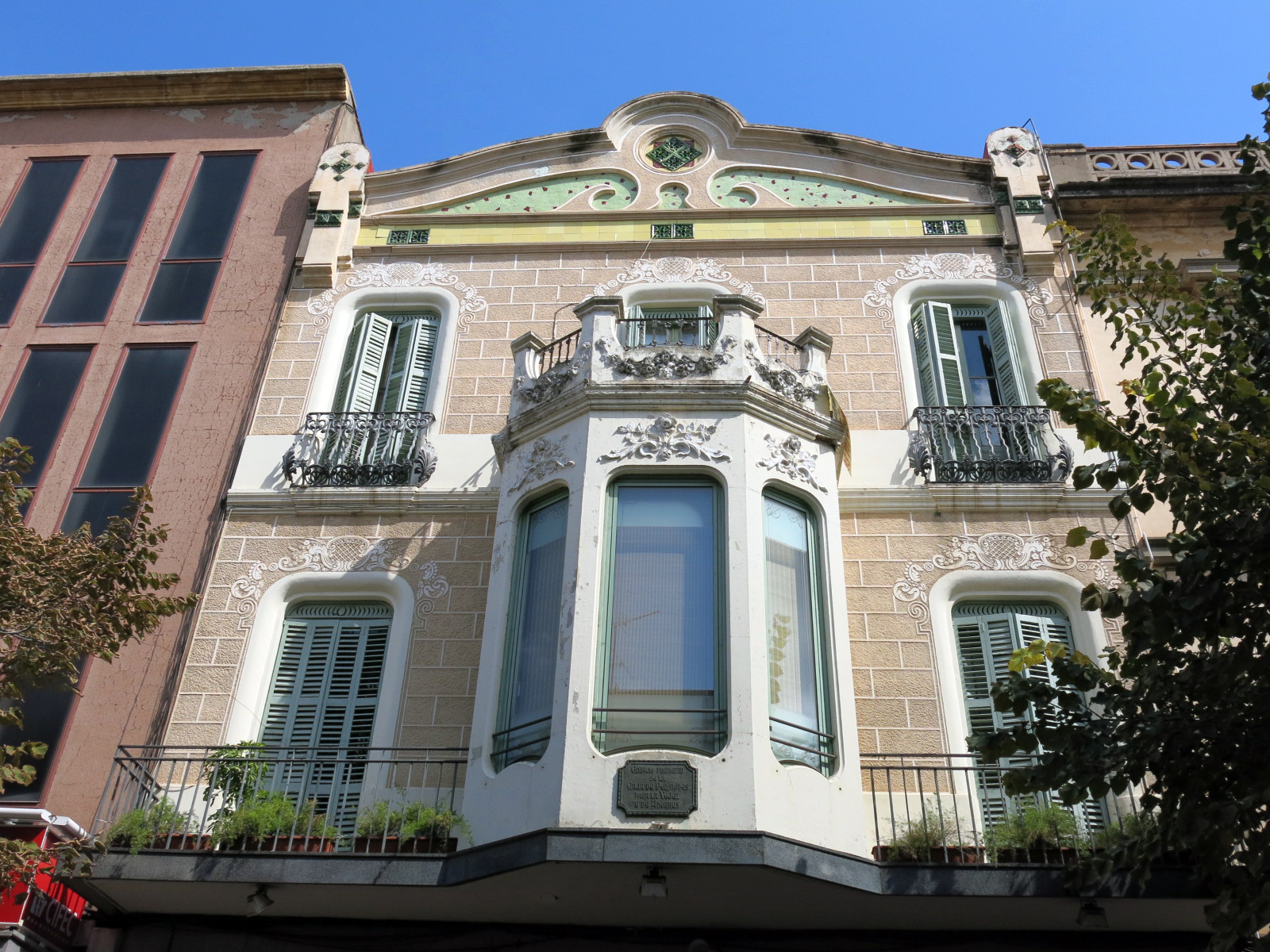 Habitatge al carrer dels Arbres, 38A (Esparreguera)